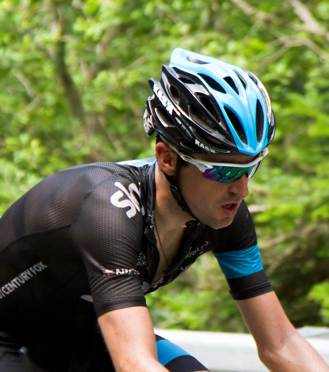 312 nieve